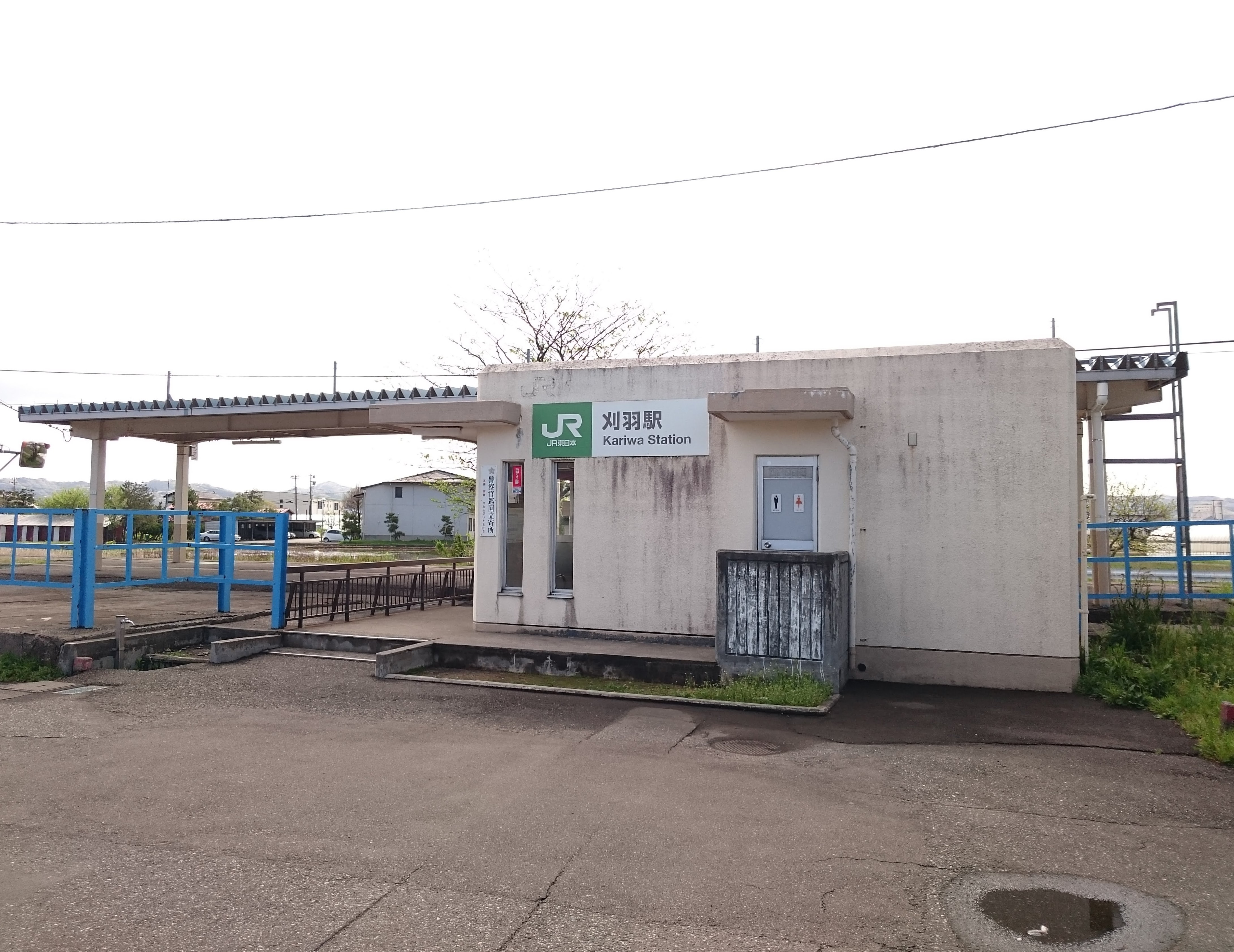 刈羽駅の駅舎外観